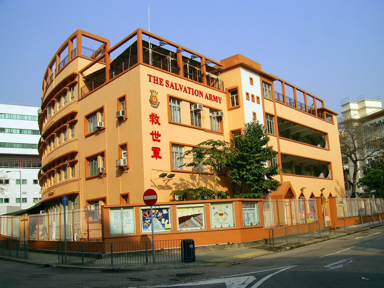 中文（香港）: 香港救世軍大坑東隊